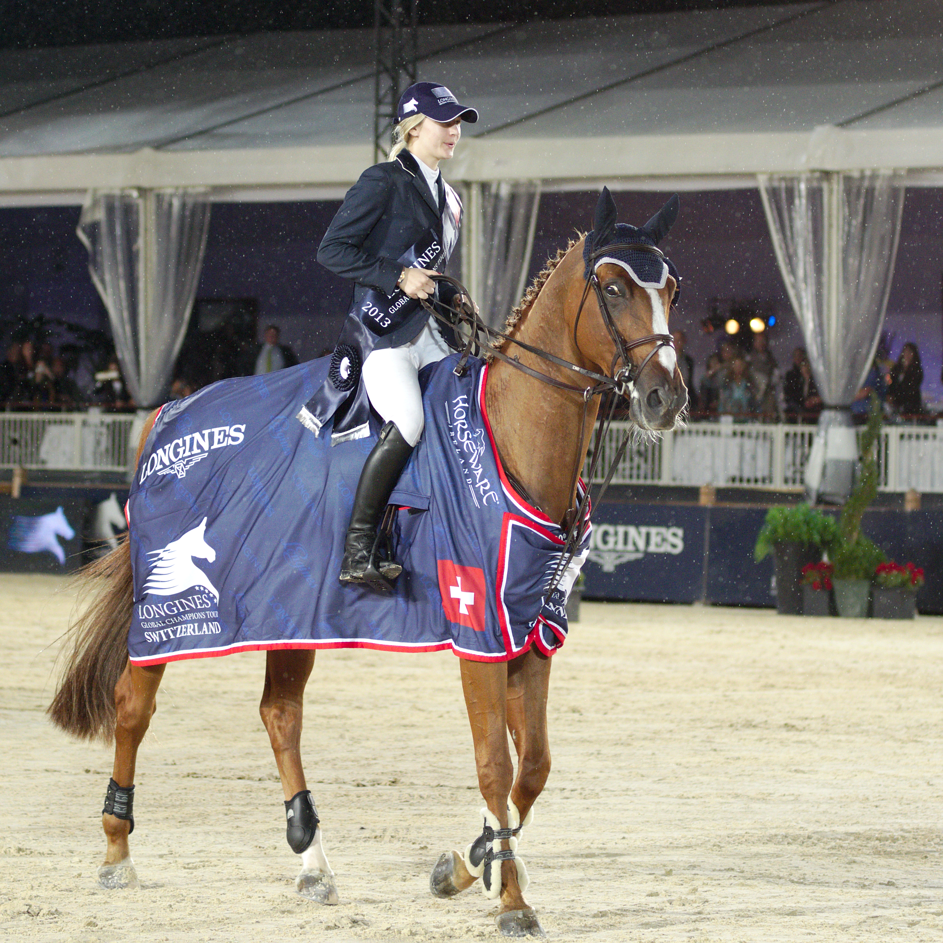 2013 Longines Global Champions - Lausanne - 14-09-2013 - Lucy Davis et Barrond